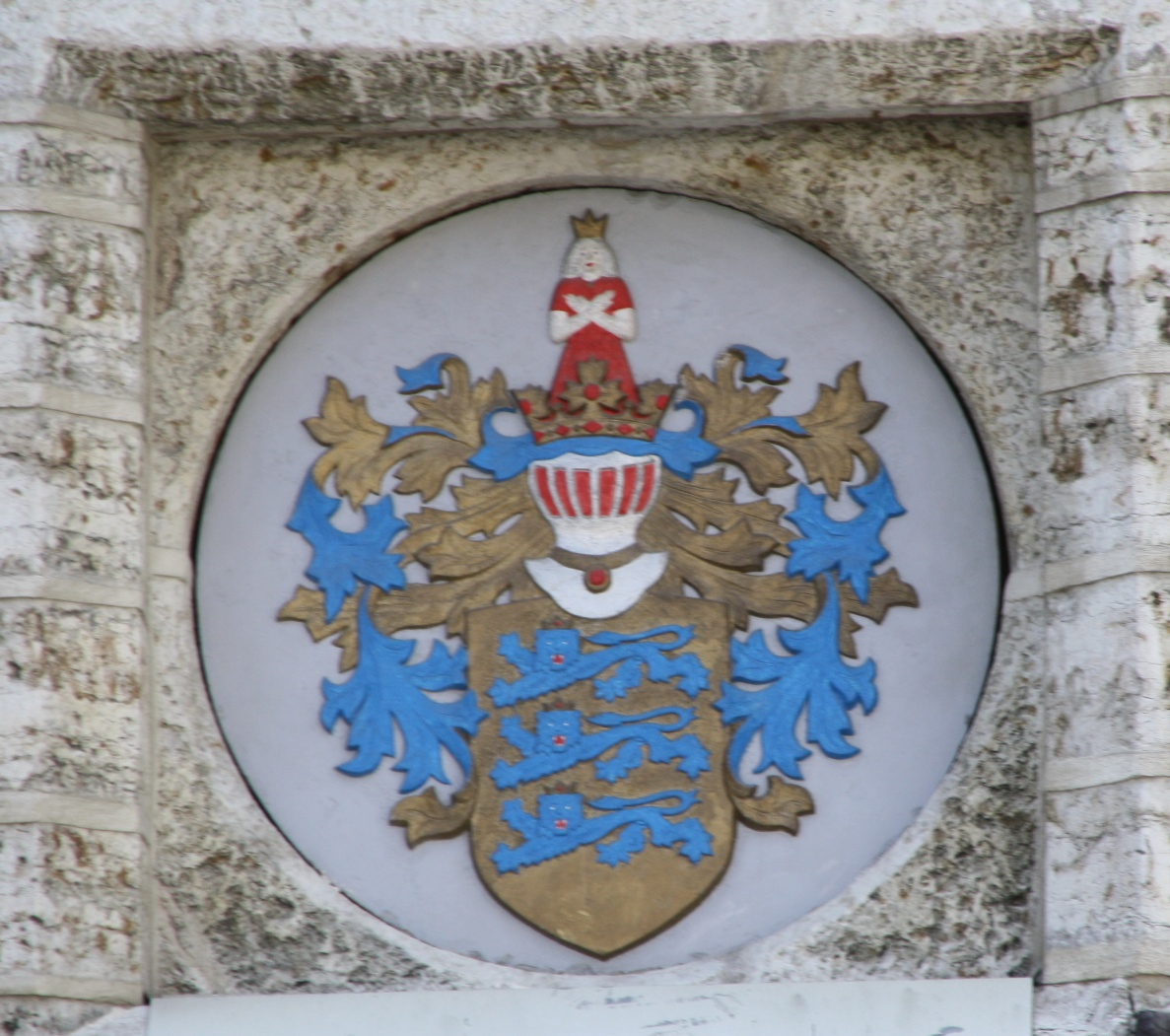 Tallinna vapp Tallinna raekoja seinal.